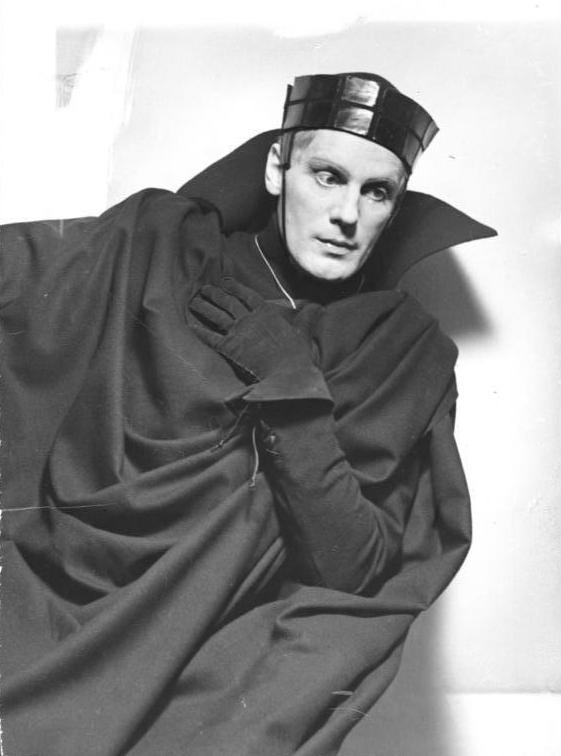 Berlin, Gustav Gründgens als "Hamlet" Berlin, 21. Januar 1936, "Hamlet" im Staatl. Schauspielhaus unter der Regie Lothar Müthels. Gustav Gründgens in der Titelrolle. 909-36 Abgebildete Personen: Gründgens, Gustav: Intendant, Regisseur, Schauspieler, Deutschland